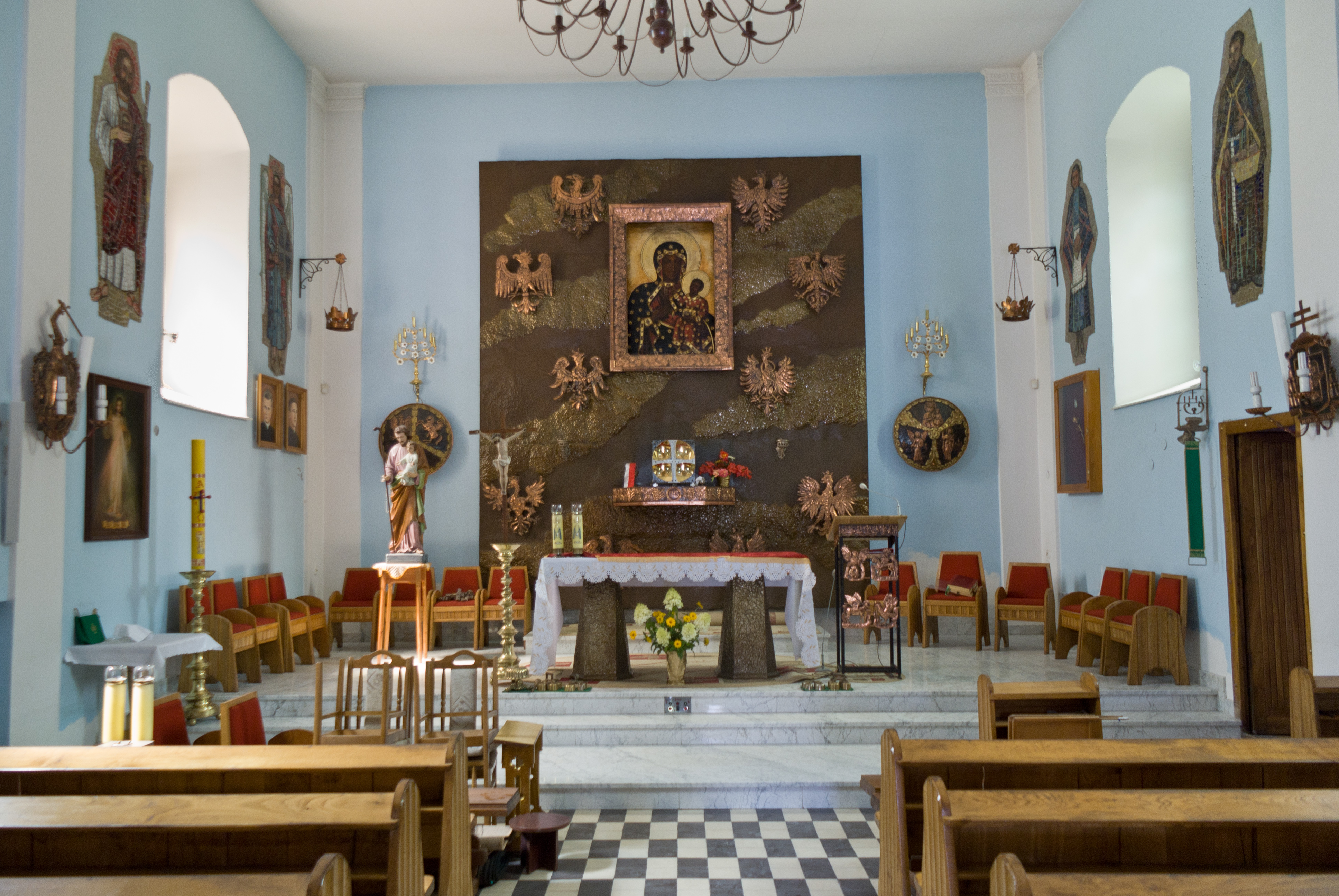 Ołtarz w kościele ofiarowania Matki Bożej w Prałkowcach